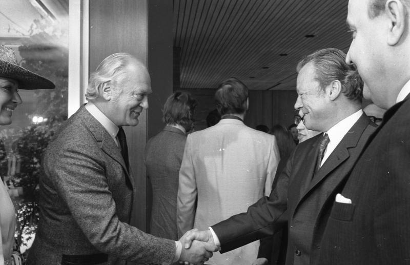 Bundeskanzler Willy Brandt empfängt Filmschauspieler